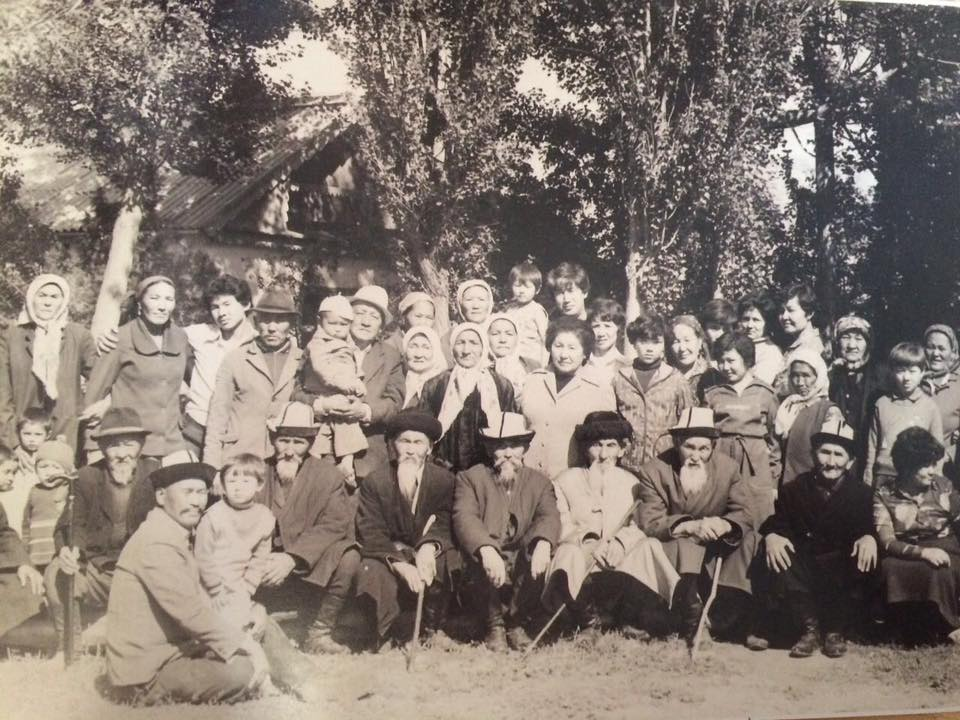 Фото родственников и односельчан села "Карагай-Булак"